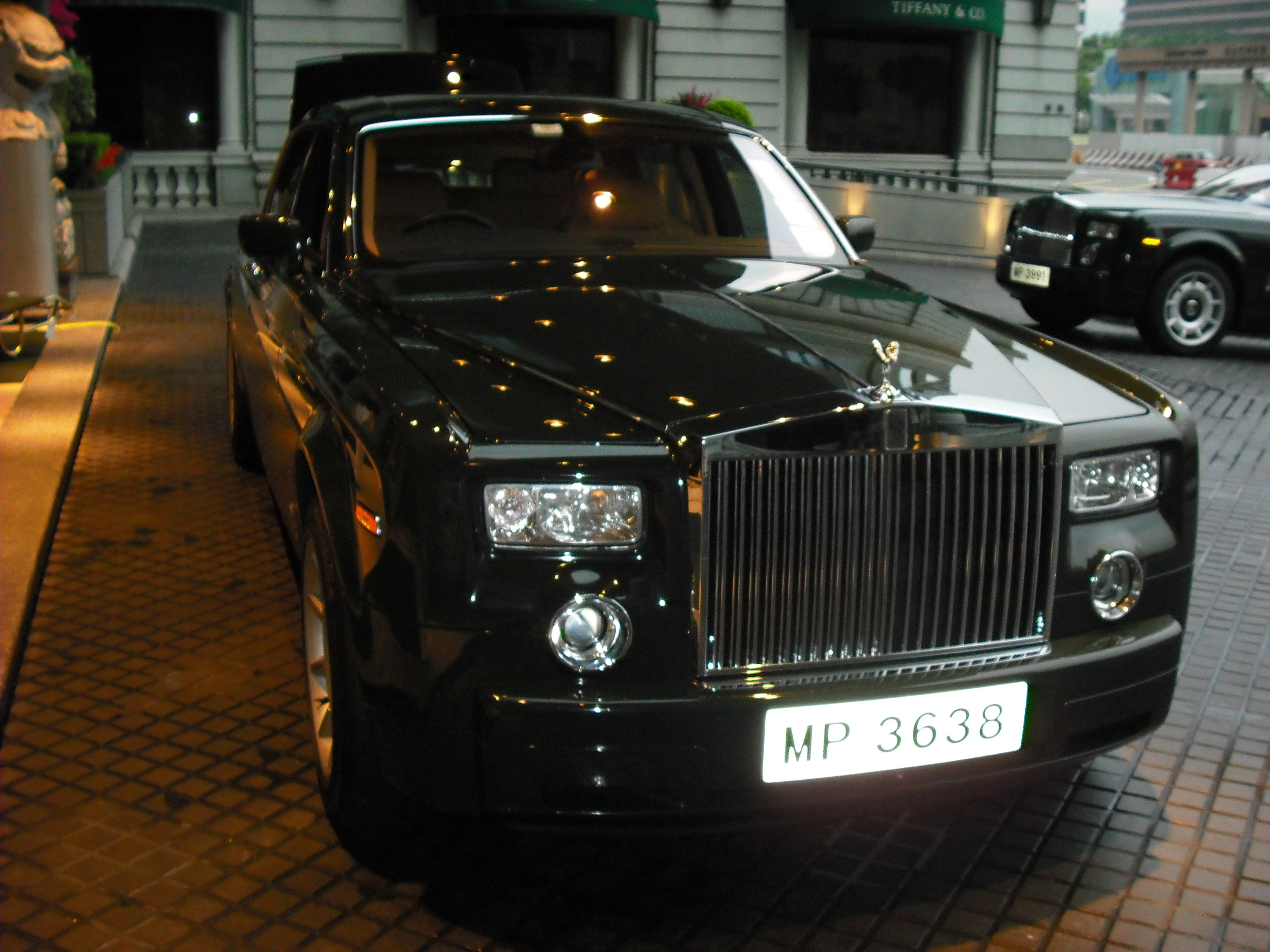 Peninsula Hong Kong RR Phantom